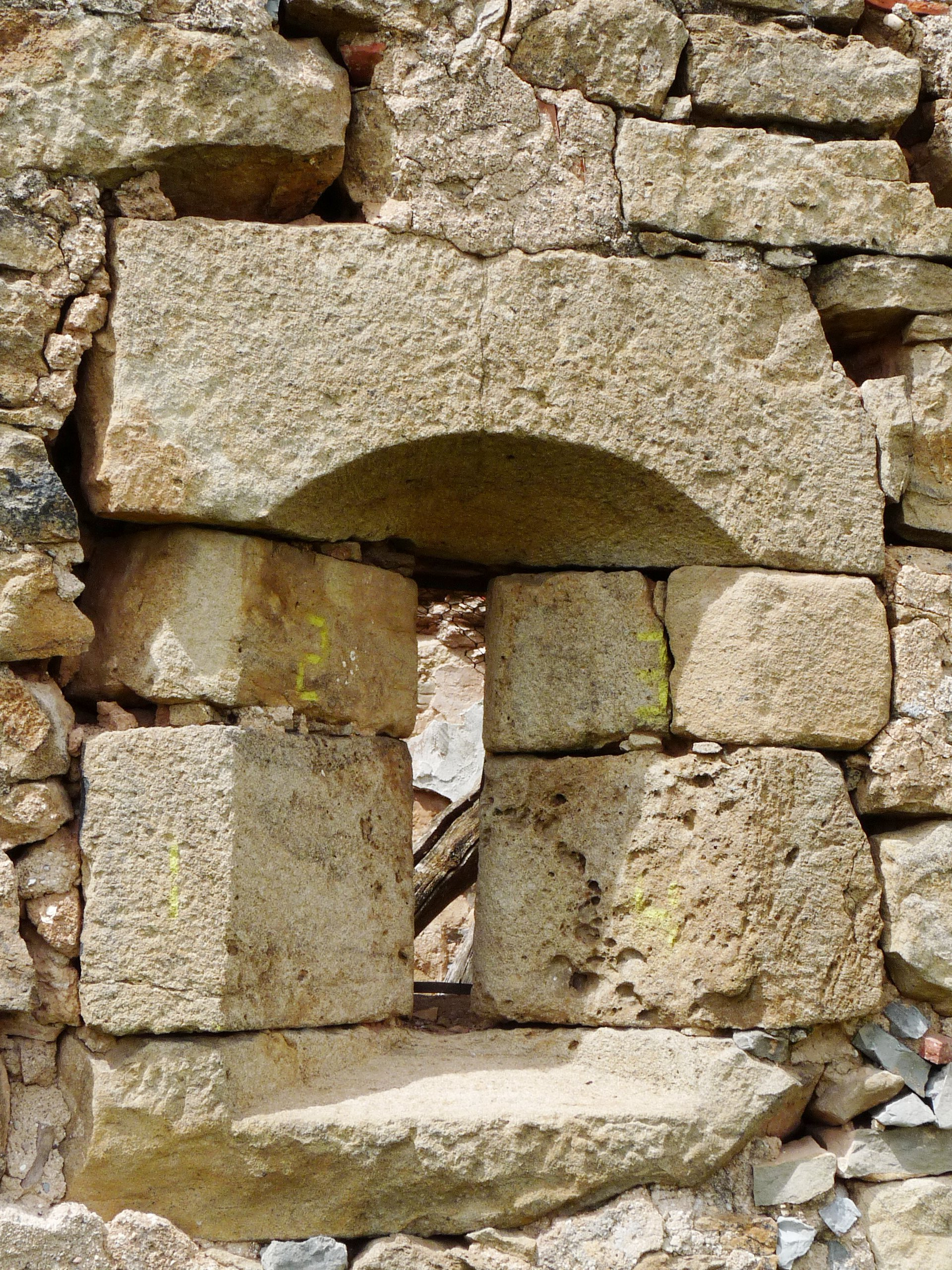 Masegoso - Iglesia de San Esteban; estilo gótico - Ventanuco